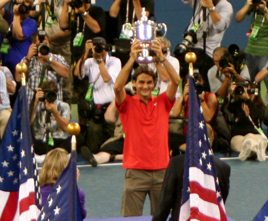 Roger Federer wins the US Open 2008